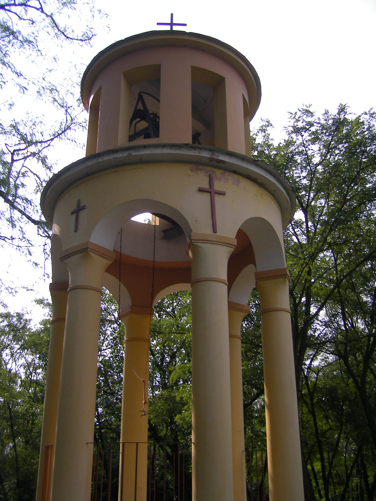 Udvard - harangtorony a Kálvárián (a község jelképe)